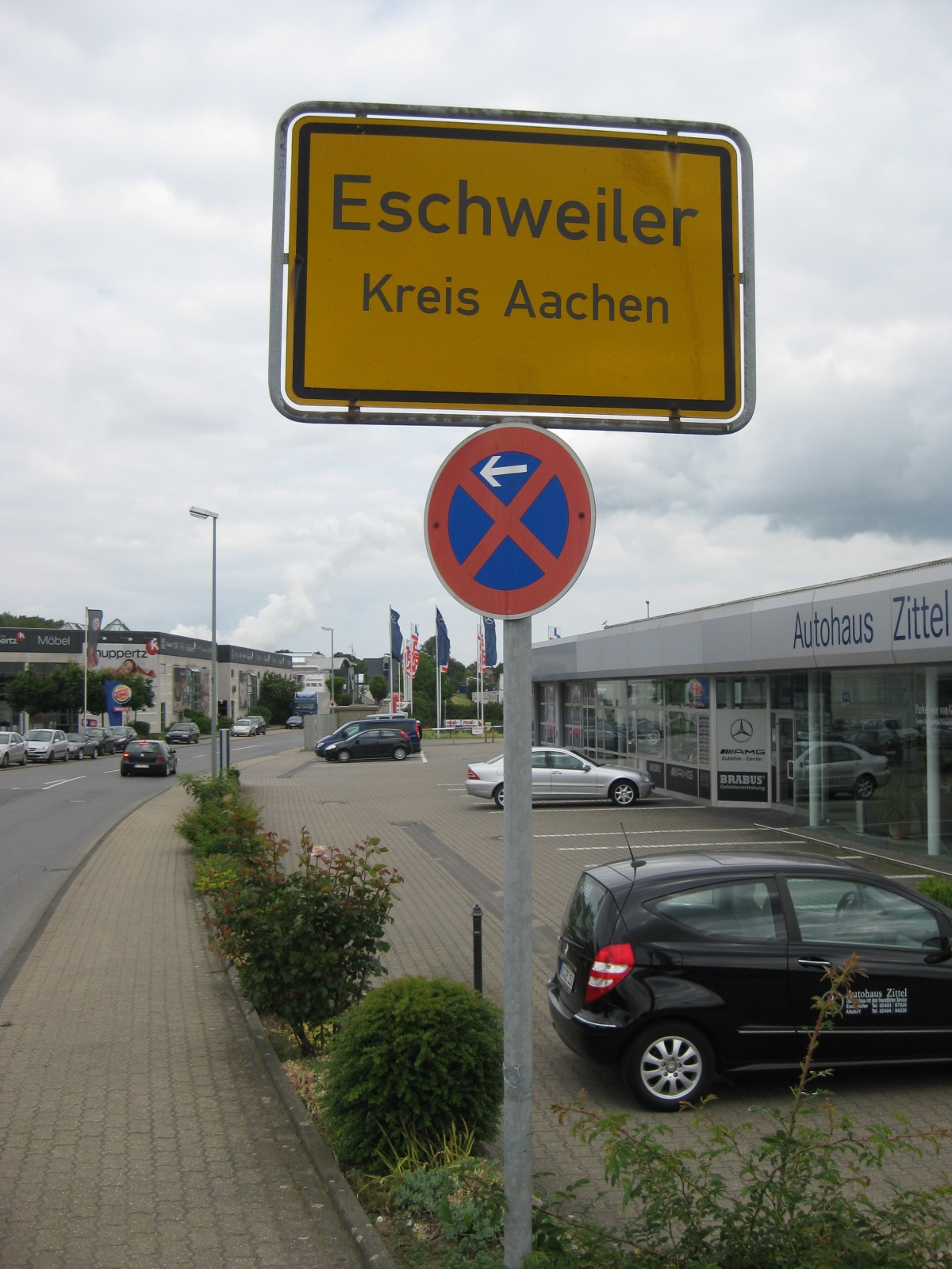 Ortseingangsschild des ehemaligen Kreises Aachen, an der Rue de Wattrelos in Eschweiler